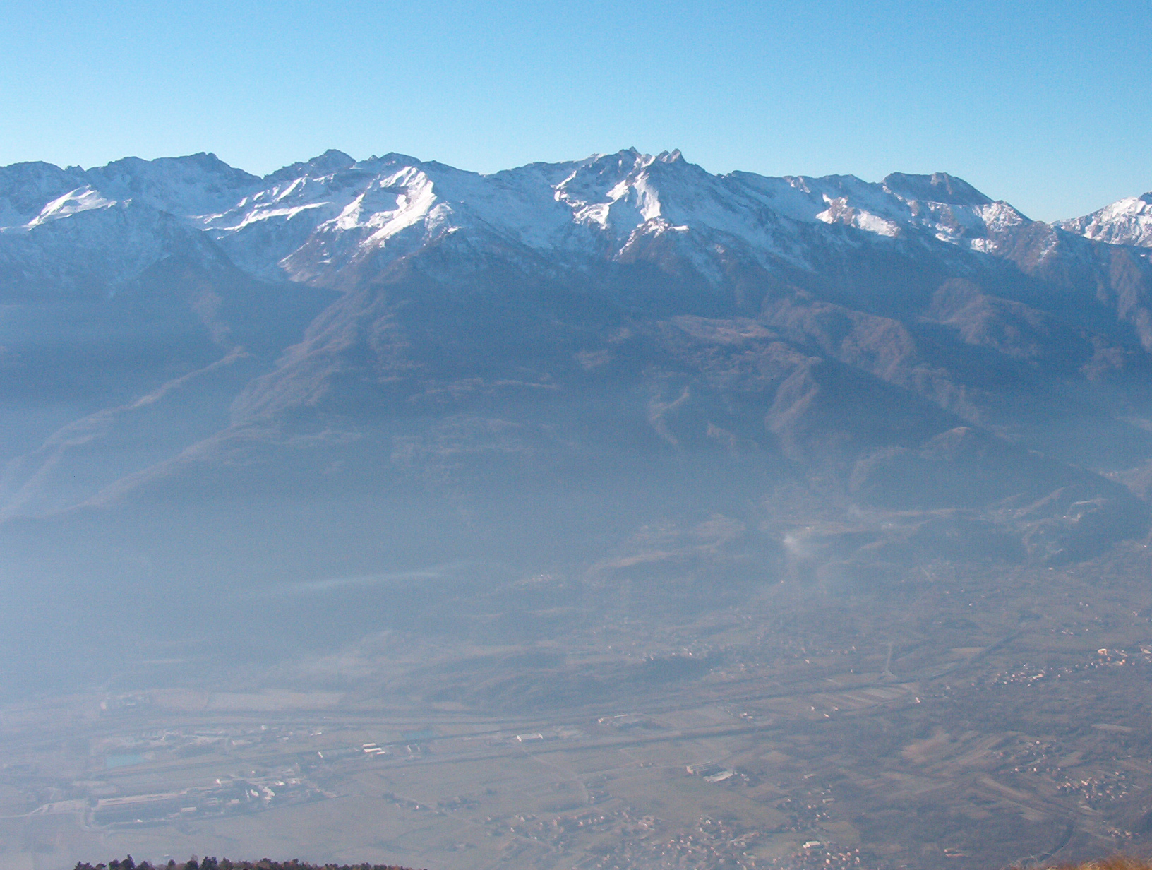 gruppo Orsiera-Rocciavrè - Valle Susa - Piemonte - Italia